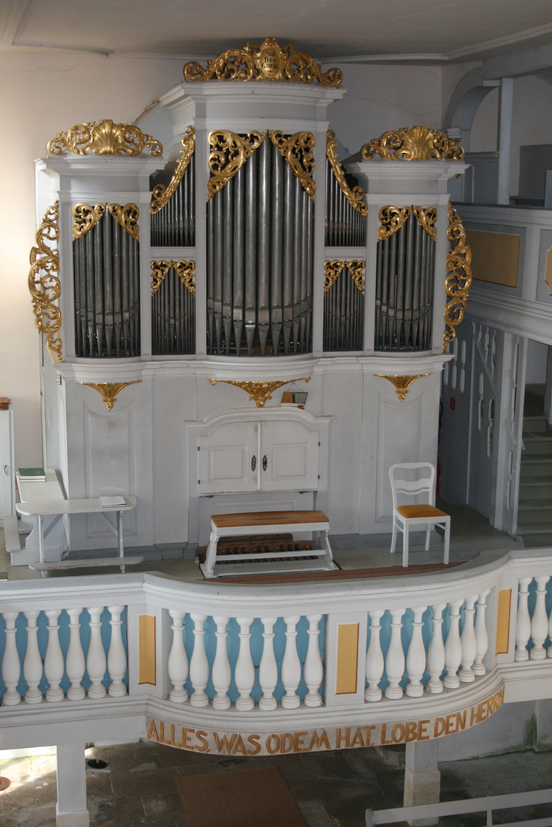 Gottfried-Silbermann-Orgel der Kirche in Reinhardtsgrimma, Sachsen, Deutschland